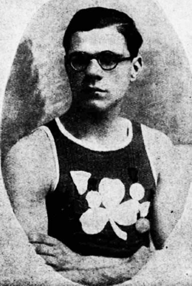 Ο Αντώνης Καρυοφύλλης αθλητής στίβου του Παναθηναϊκού και σημαιοφόρος της ελληνικής ολυμπιακής ομάδας το 1928